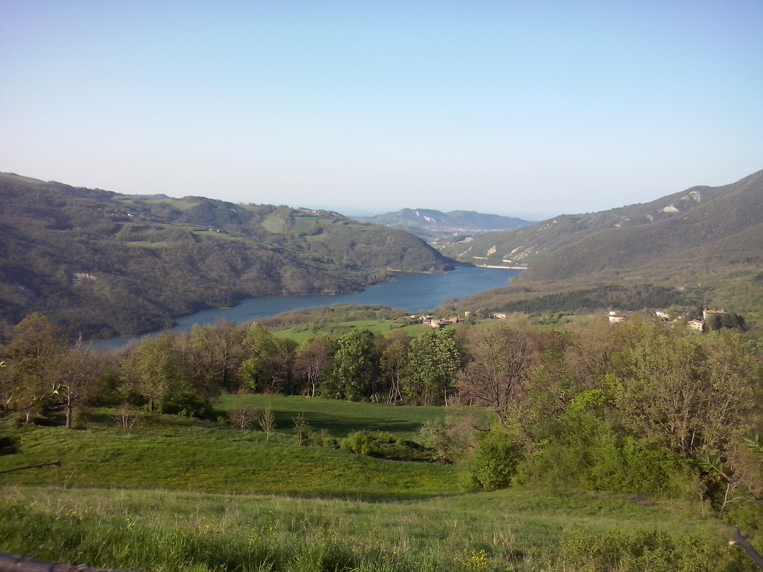 Il Lago di Mignano visto da Vezzolacca